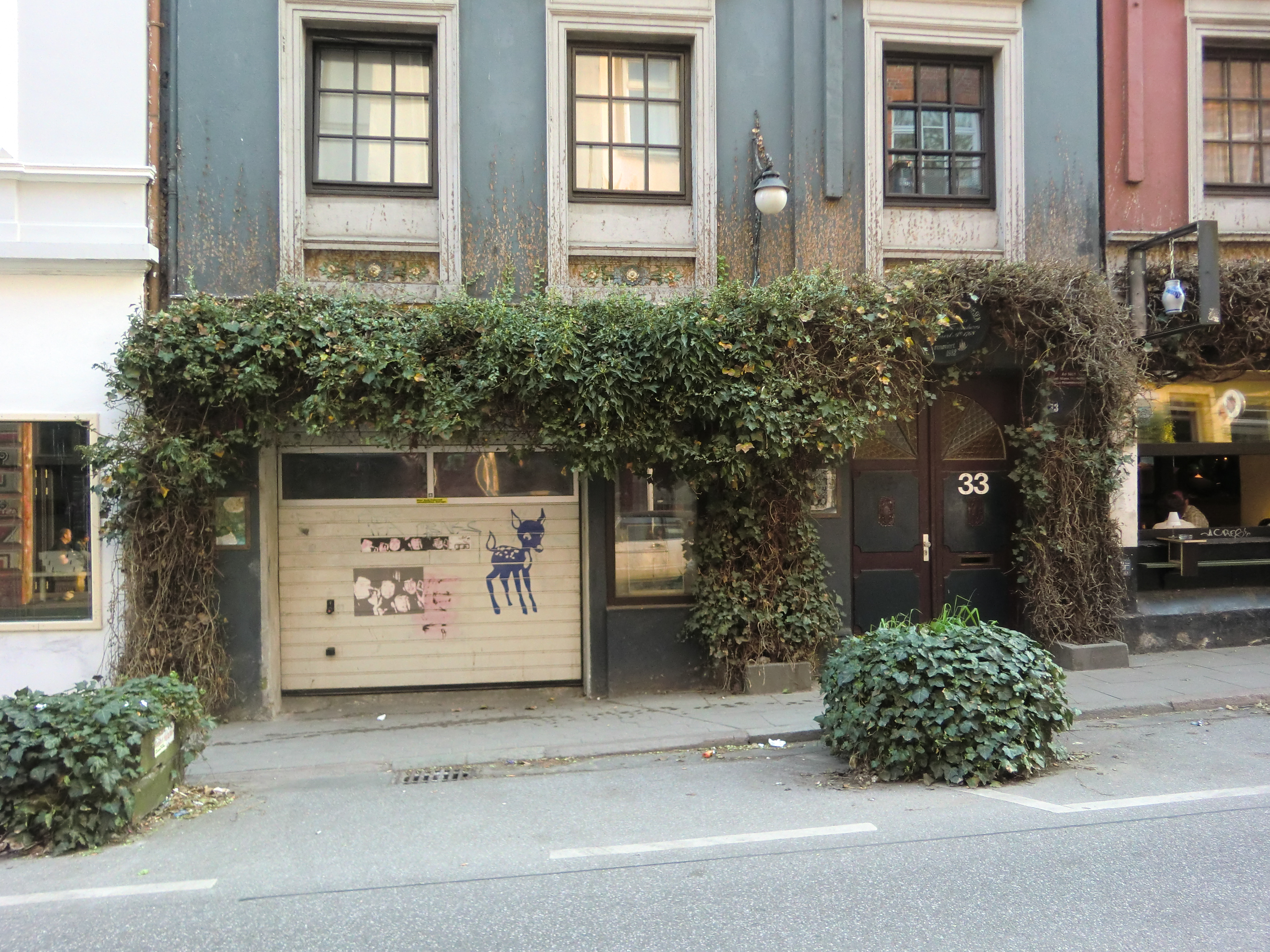 Bambi Kino, Hamburg, Paul-Roosen-Straße 33, hier waren die Beatles in einem Abstellraum neben der Toilette untergebracht, das auch gleichzeitig als Waschgelegenheit diente.